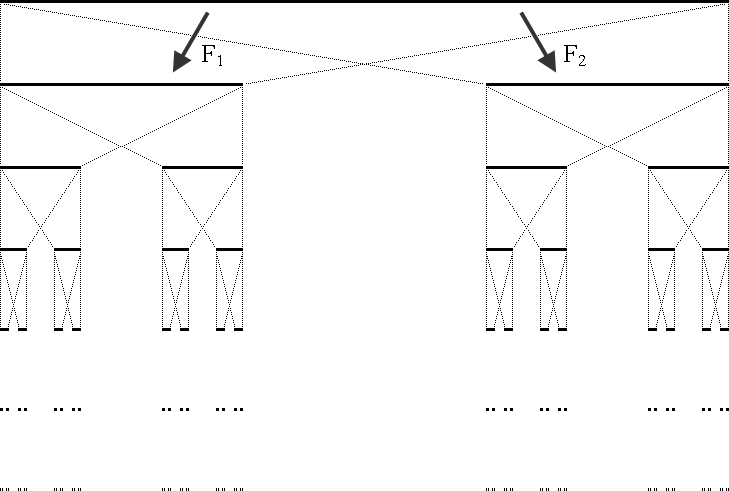 から下に3等分した真中を抜くという操作を繰り返す。その極限がカントール集合である。